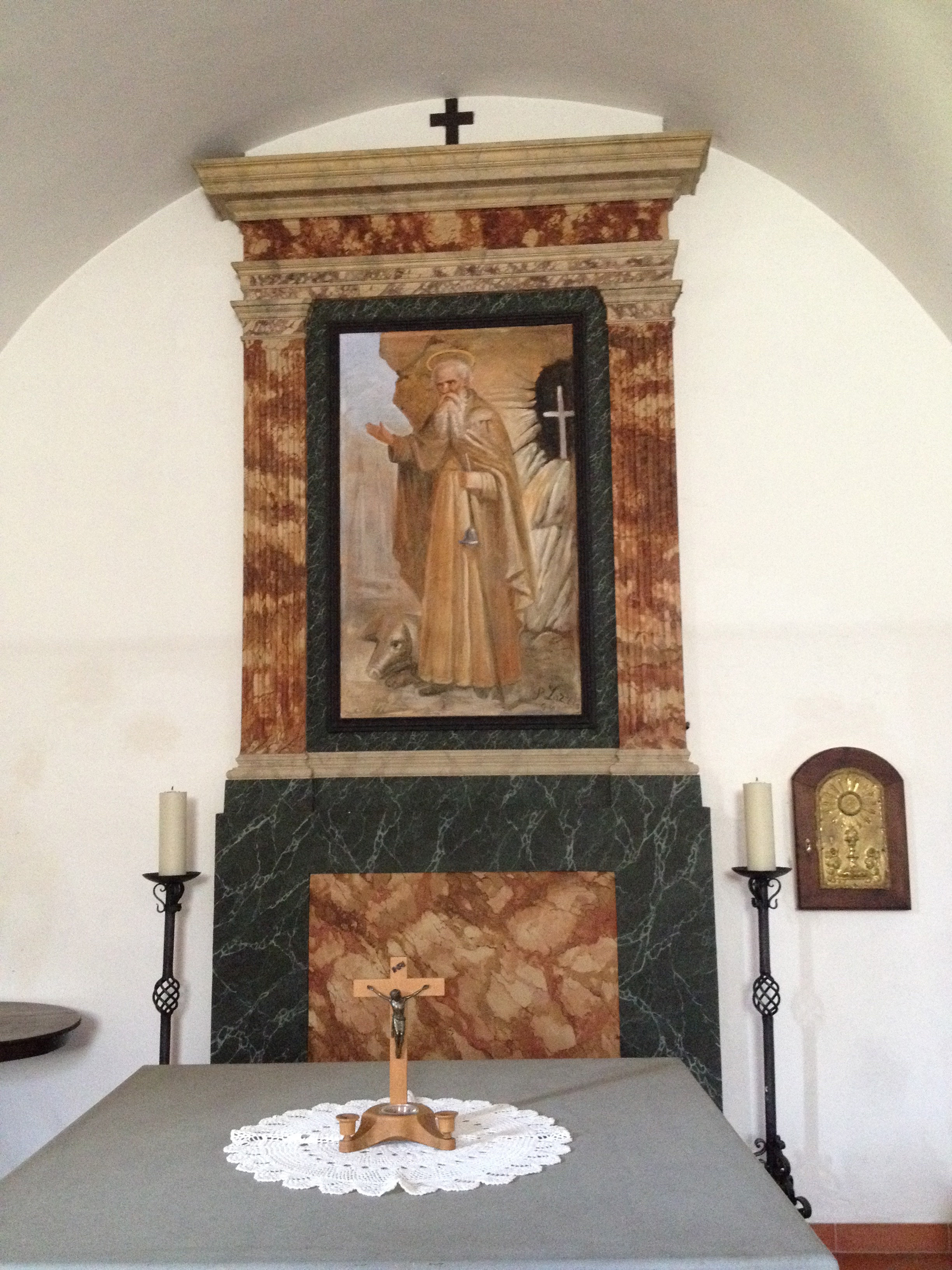 Chor der Kapelle Sant’Antonio Abate in Astano mit Wandmalerei des Titelheiligen von Pietro Lozzio